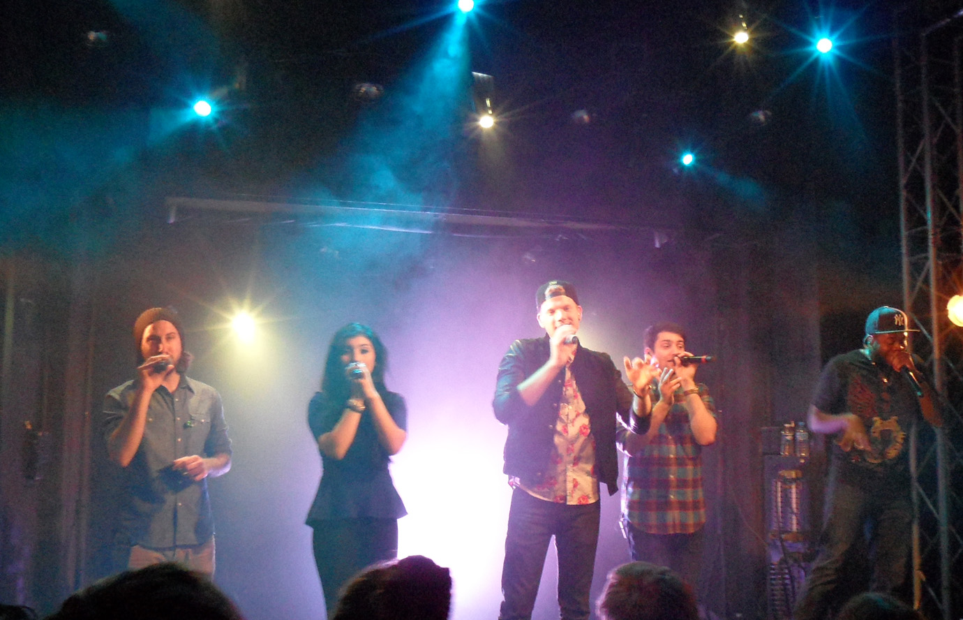 Le groupe pentatonix en concert à La Flèche d'or à Paris